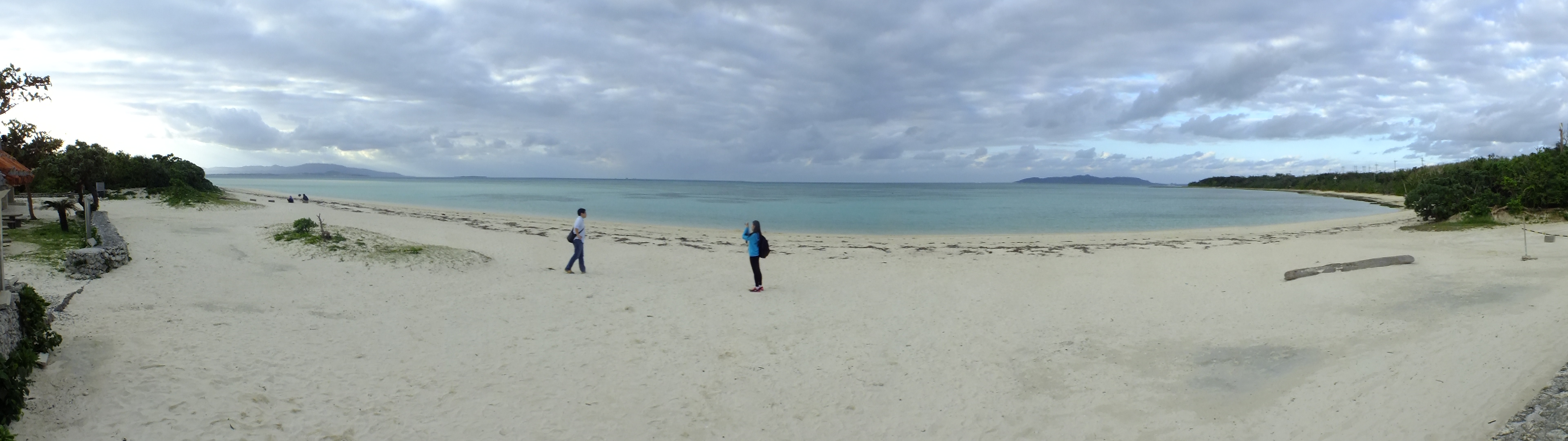 2015-12-19 Kondoi Beach Taketomi-Island,Okinawa コンドイ浜（沖縄県八重山郡竹富町竹富）